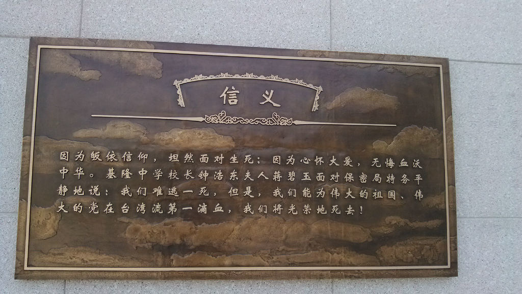 信义